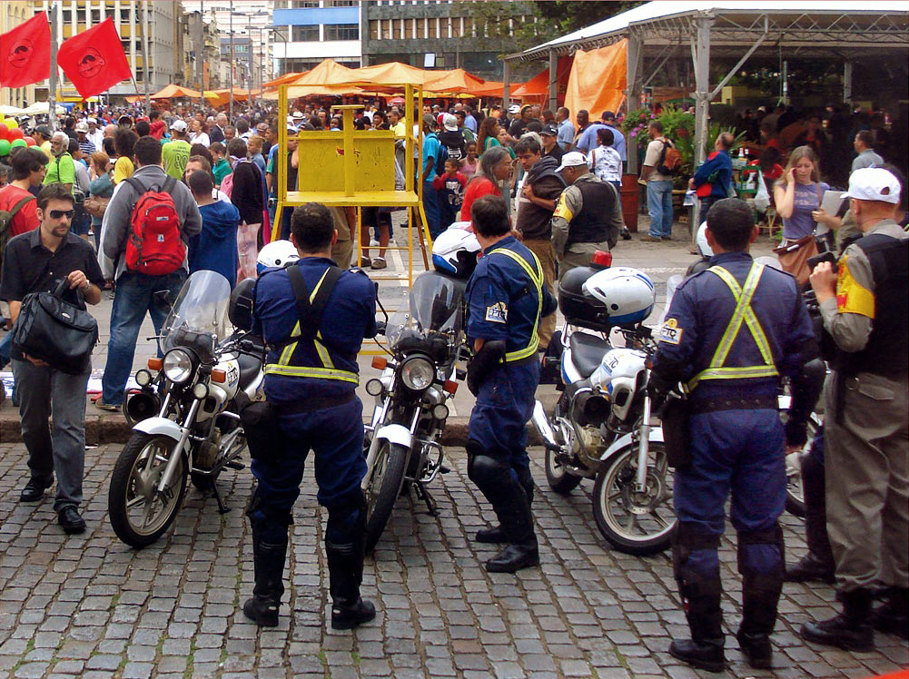 Fiscais da EPTC (uniforme azul) e soldados da Brigada Militar (uniforme pardo) em vigia a uma manifestação pública no Largo Glênio Peres, Porto Alegre.